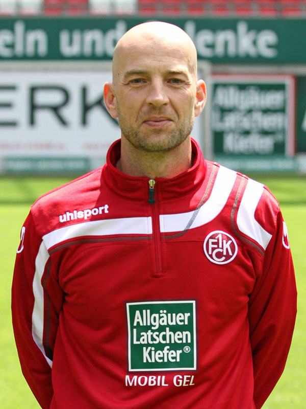 Günther Gorenzel, Co-Trainer des 1. FC Kaiserslautern